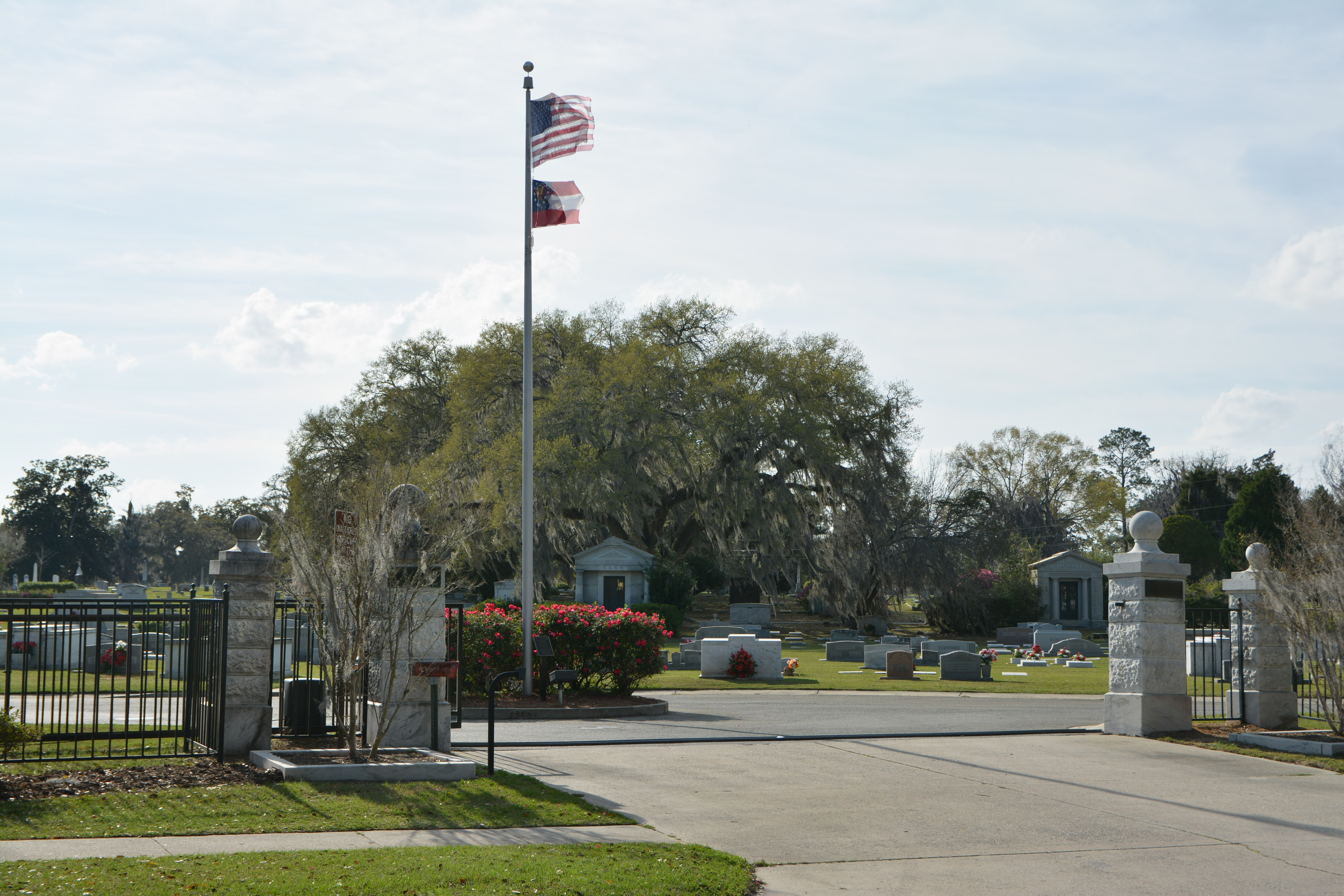 Sunset Hill Cemetery, Valdosta, Georgia, U.S.